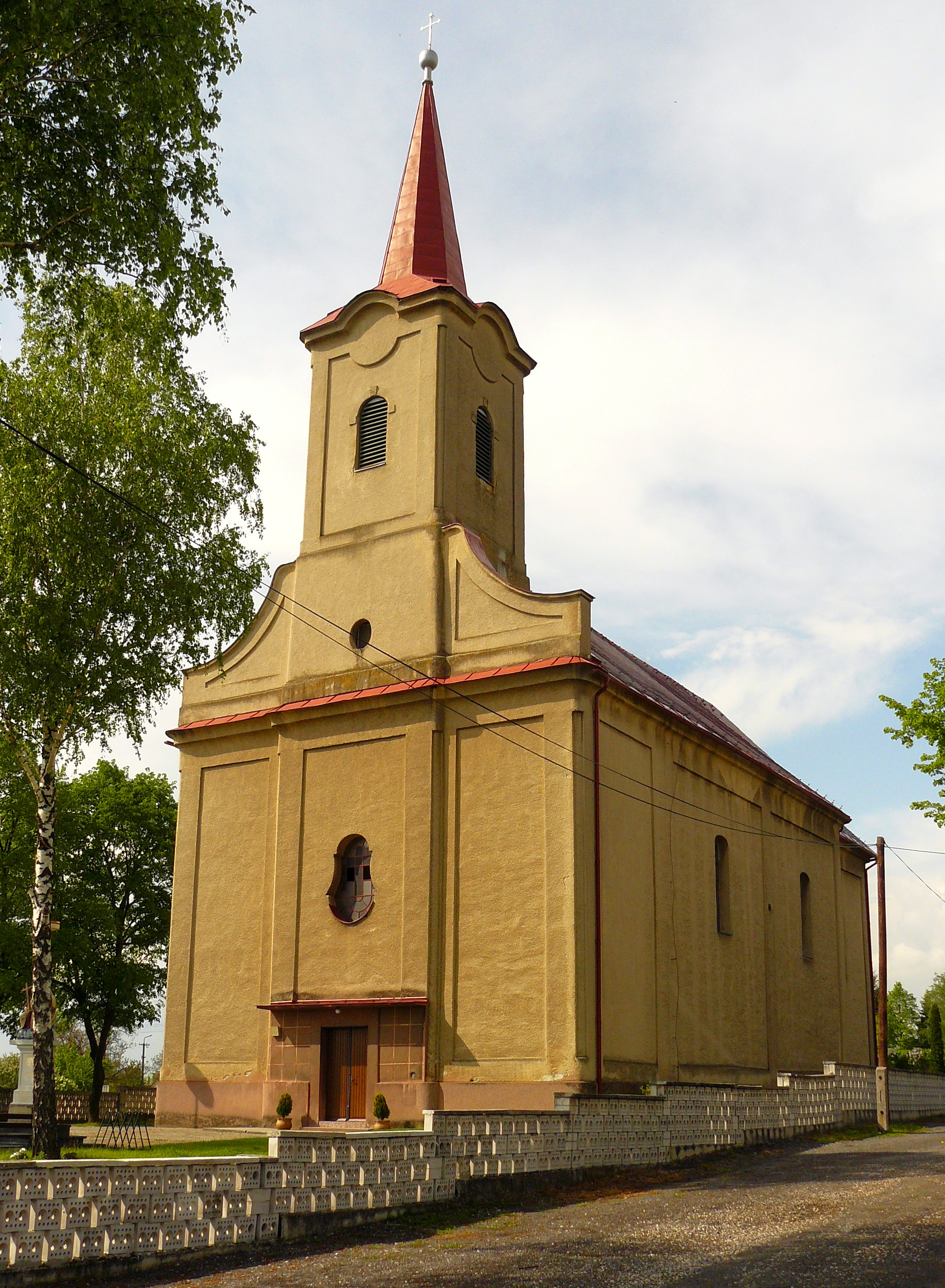 Csiffár